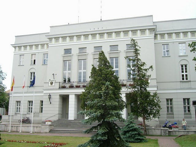 Urząd Miasta Tomaszów Mazowiecki